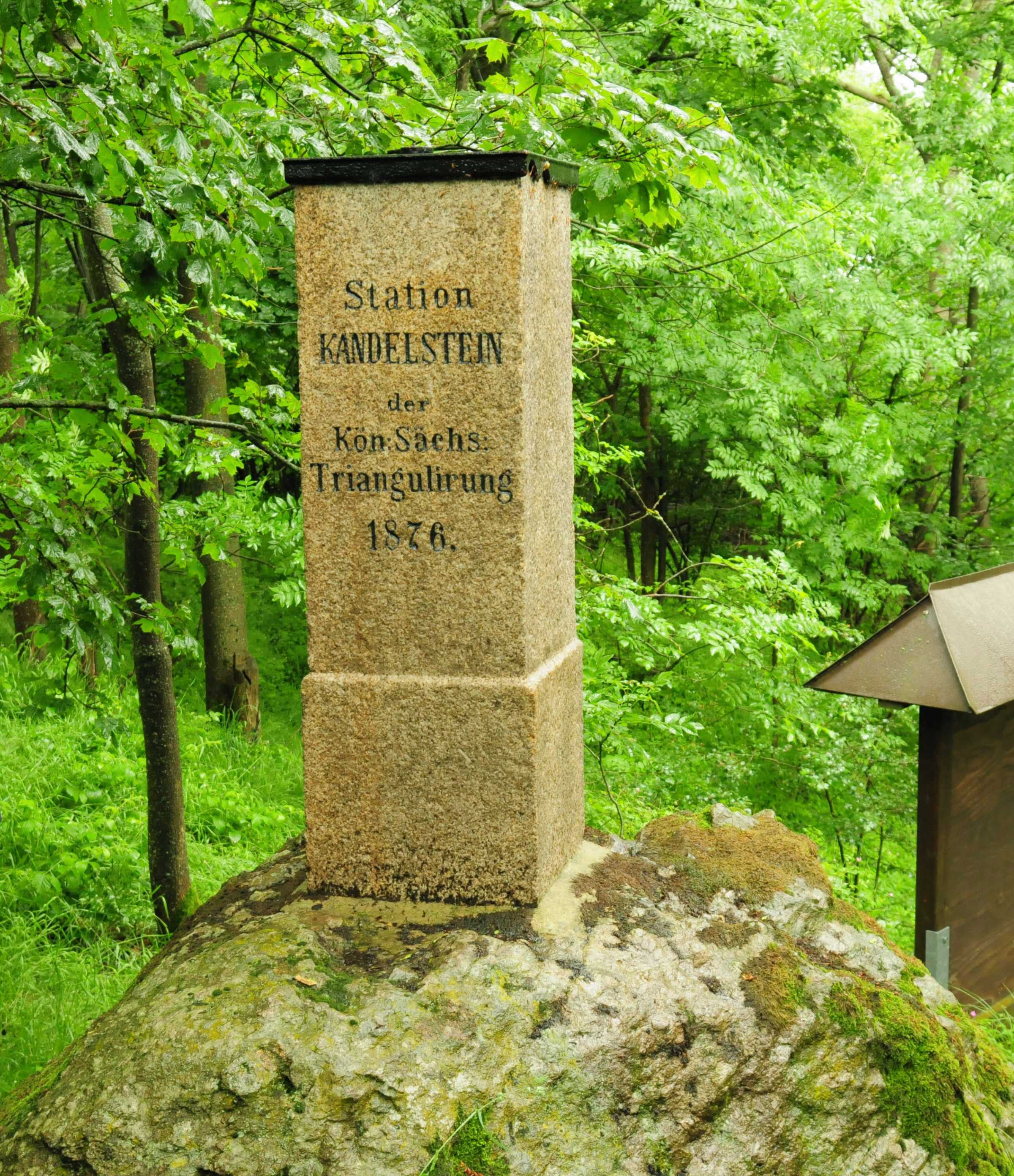 Trigonometrischer Punkt 2. Ordnung Nr. 158 der Königlich-Sächsischen Triangulirung auf dem Kandelstein bei Gutenfürst im Vogtland (Sachsen, Deutschland)